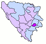 BosniaCanton Bosnian-Podrinje